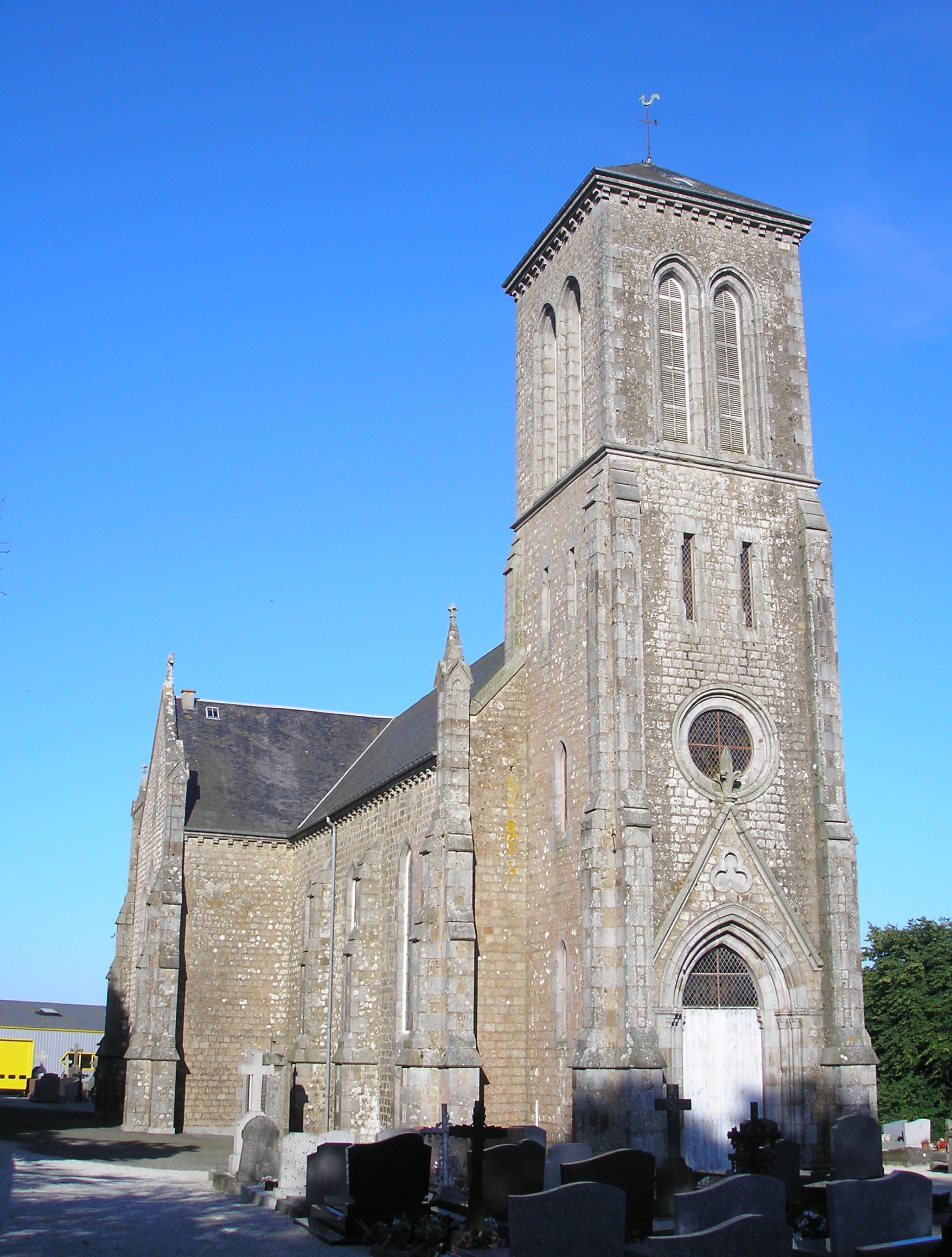 Saint-Clément-Rancoudray (Normandie, France). L'église Saint-Clément.